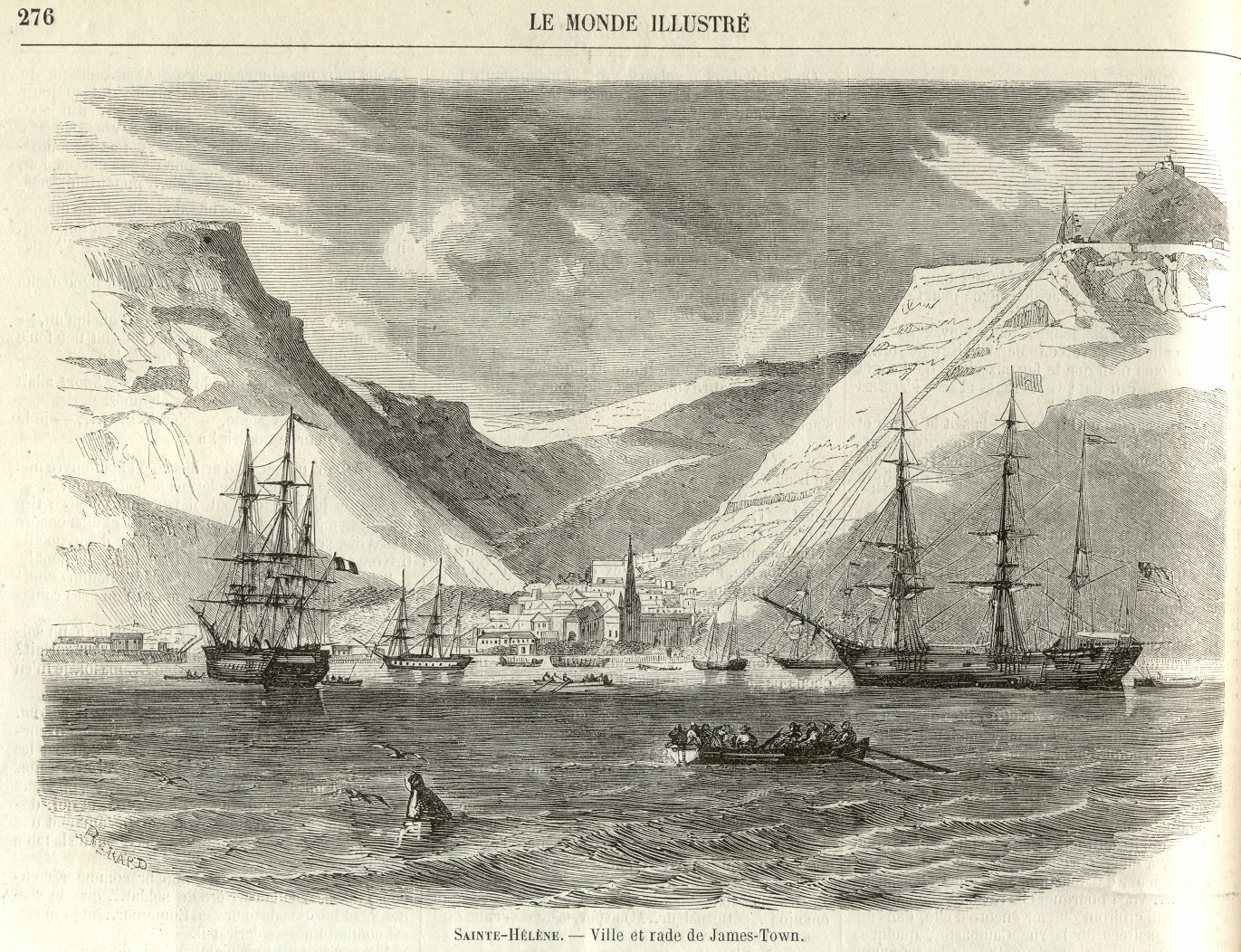 Sainte-Hélène - Ville et rade de James-Town